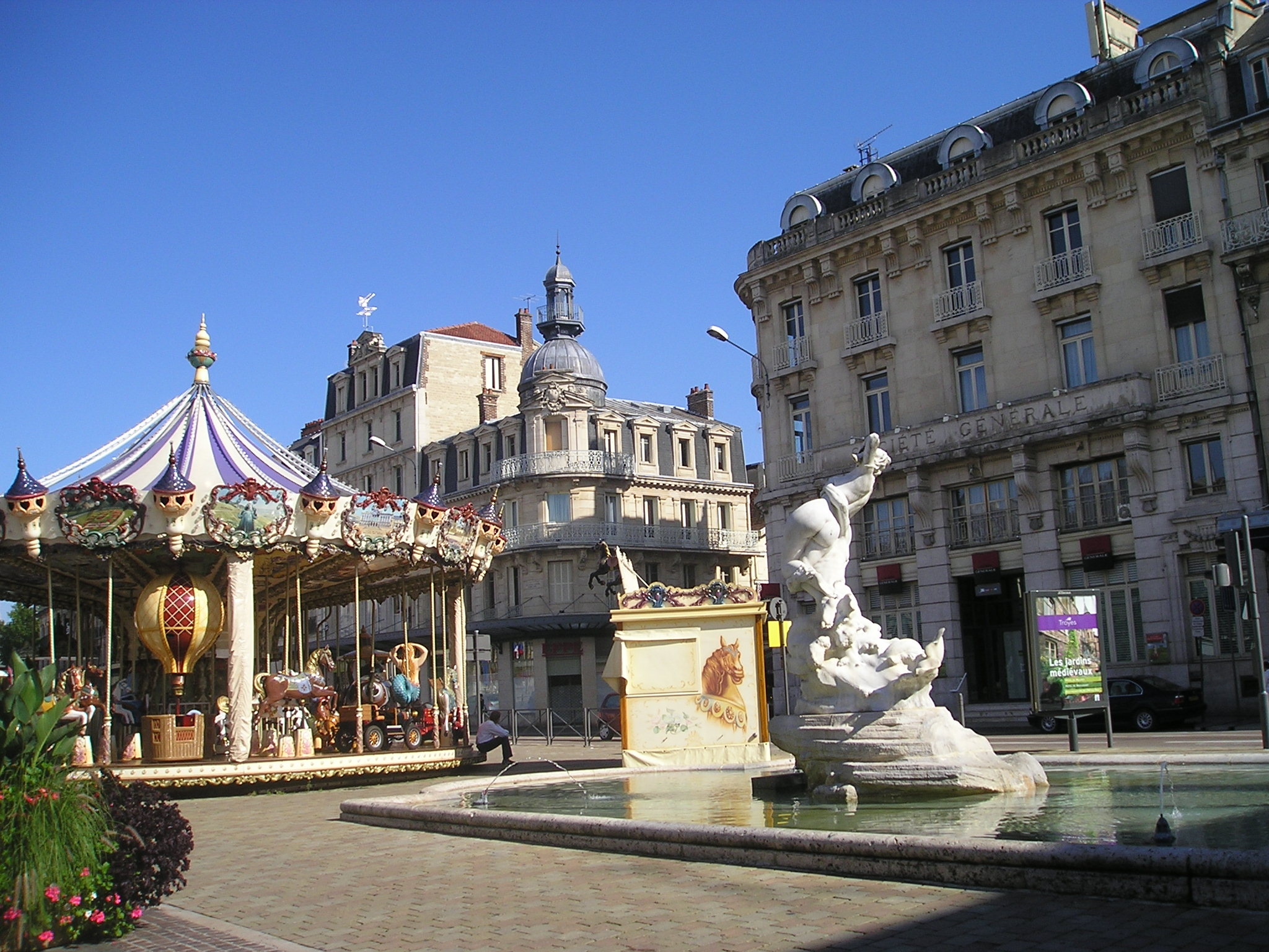 Troyes